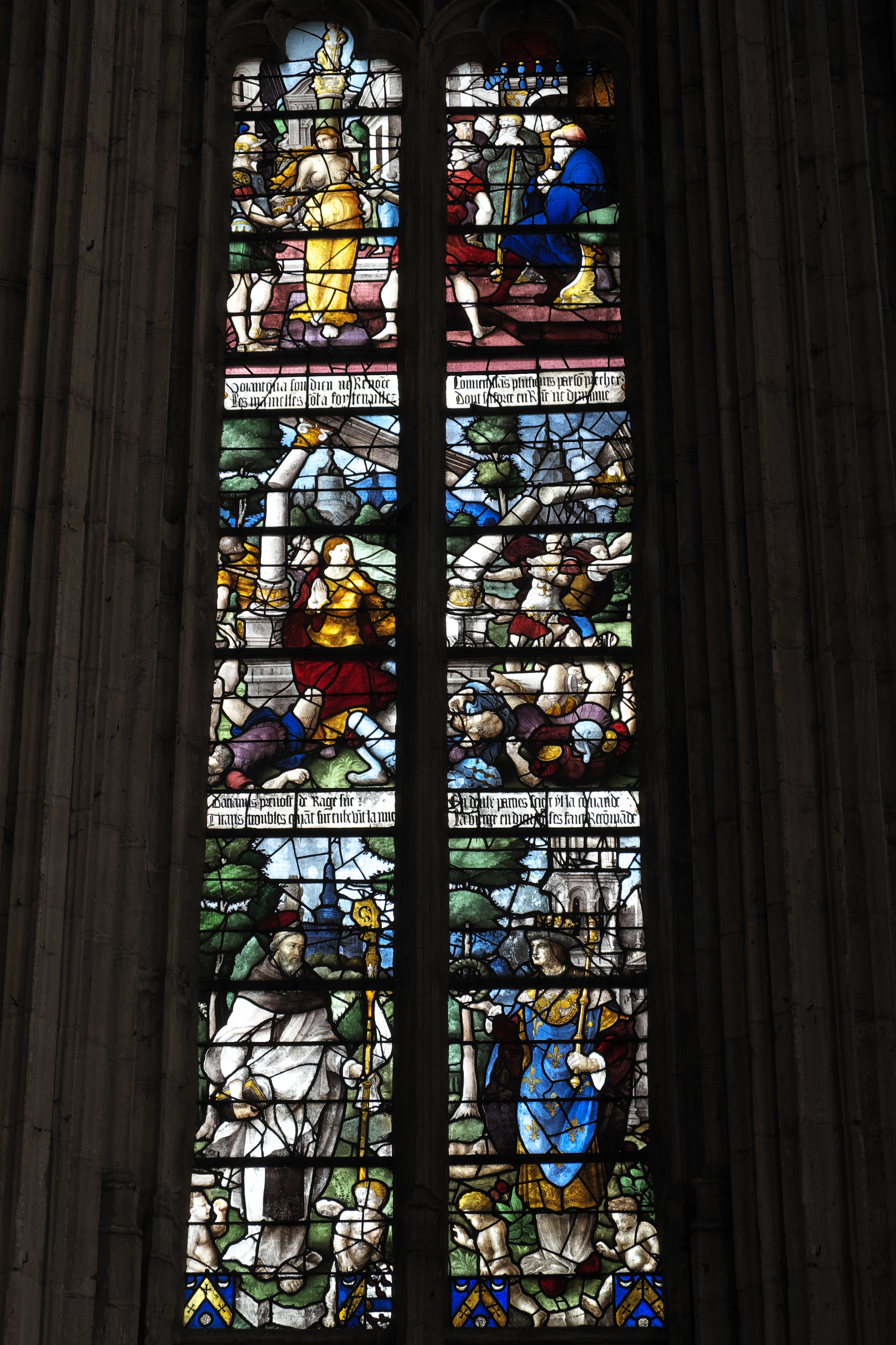 Katholische Kirche Sainte-Foy in Conches-en-Ouche im Département Eure (Haute-Normandie/Frankreich), Bleiglasfenster aus der 1. Hälfte des 16. Jahrhunderts im Chor; Darstellung: Martyrium der hl. Fides von Agen, unten: Abt und Ludwig der Heilige